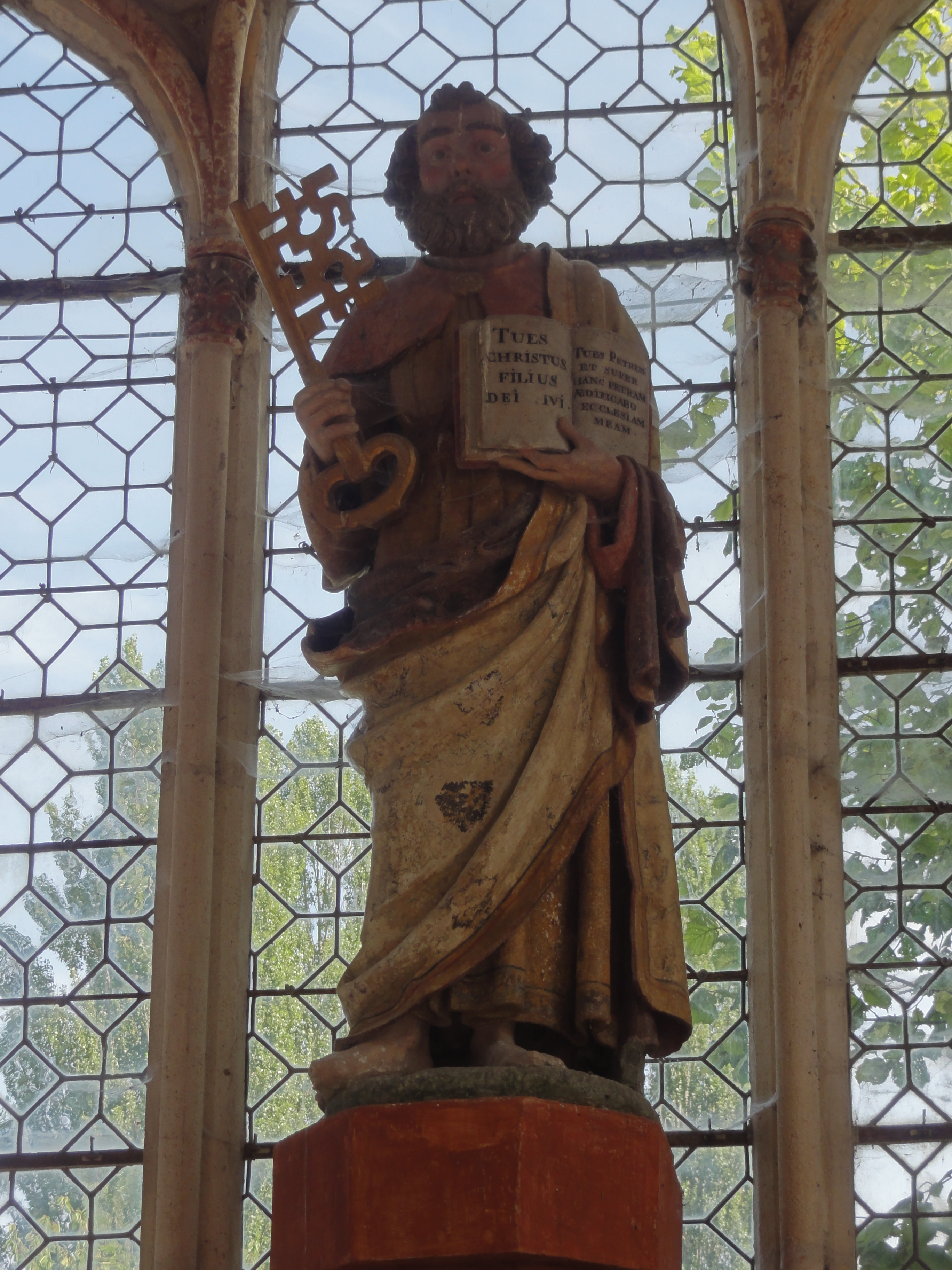 Statue de saint Pierre, fin XVIe / début XVIIe siècle.